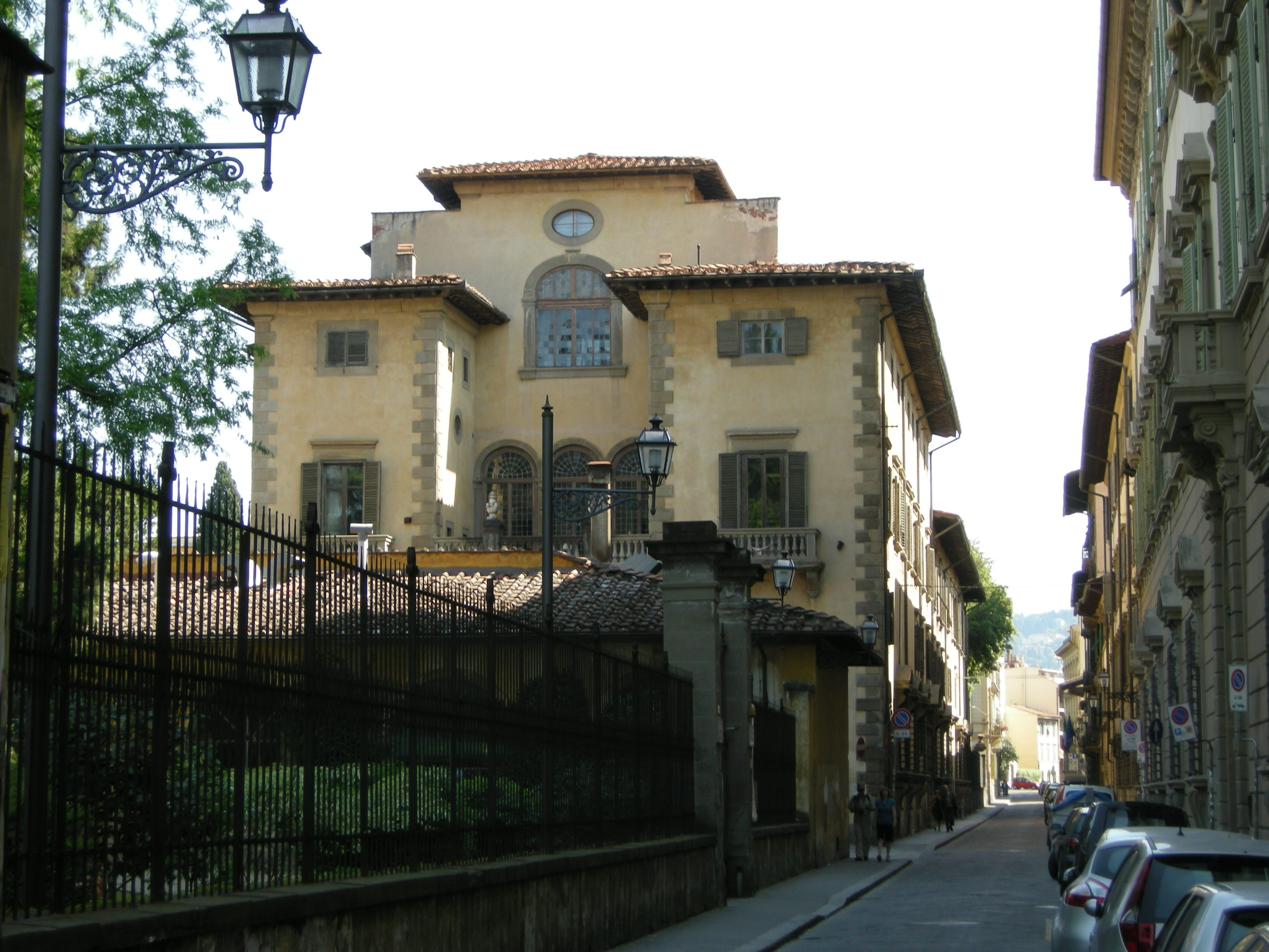 Palazzo di San Clemente